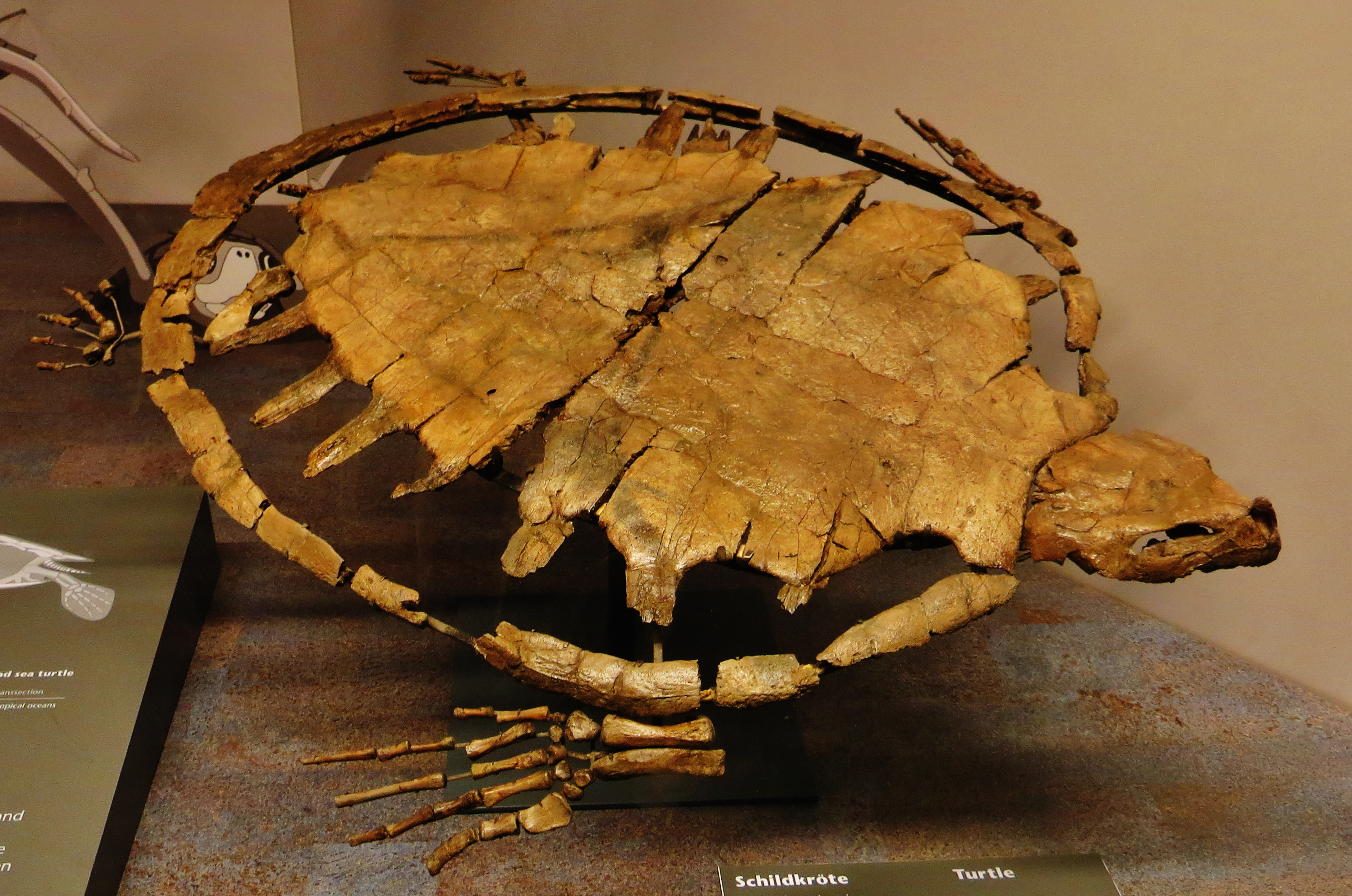 Fossil - Took the picture at Natural History Museum, Karlsruhe